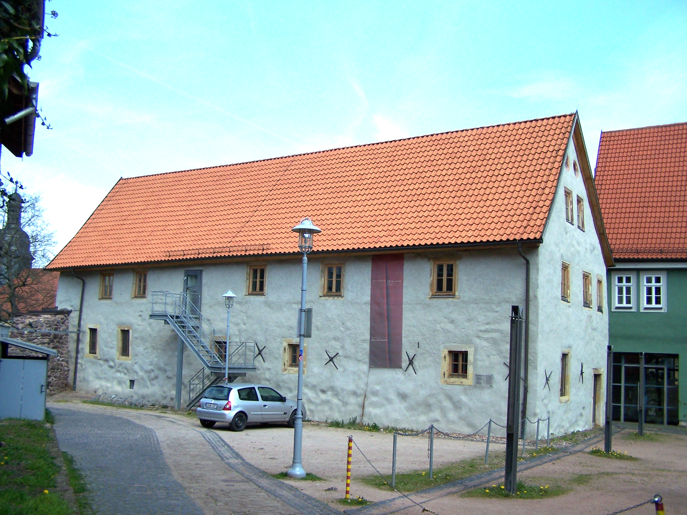 Eisenach, Kemenate des Hellgrevenhof